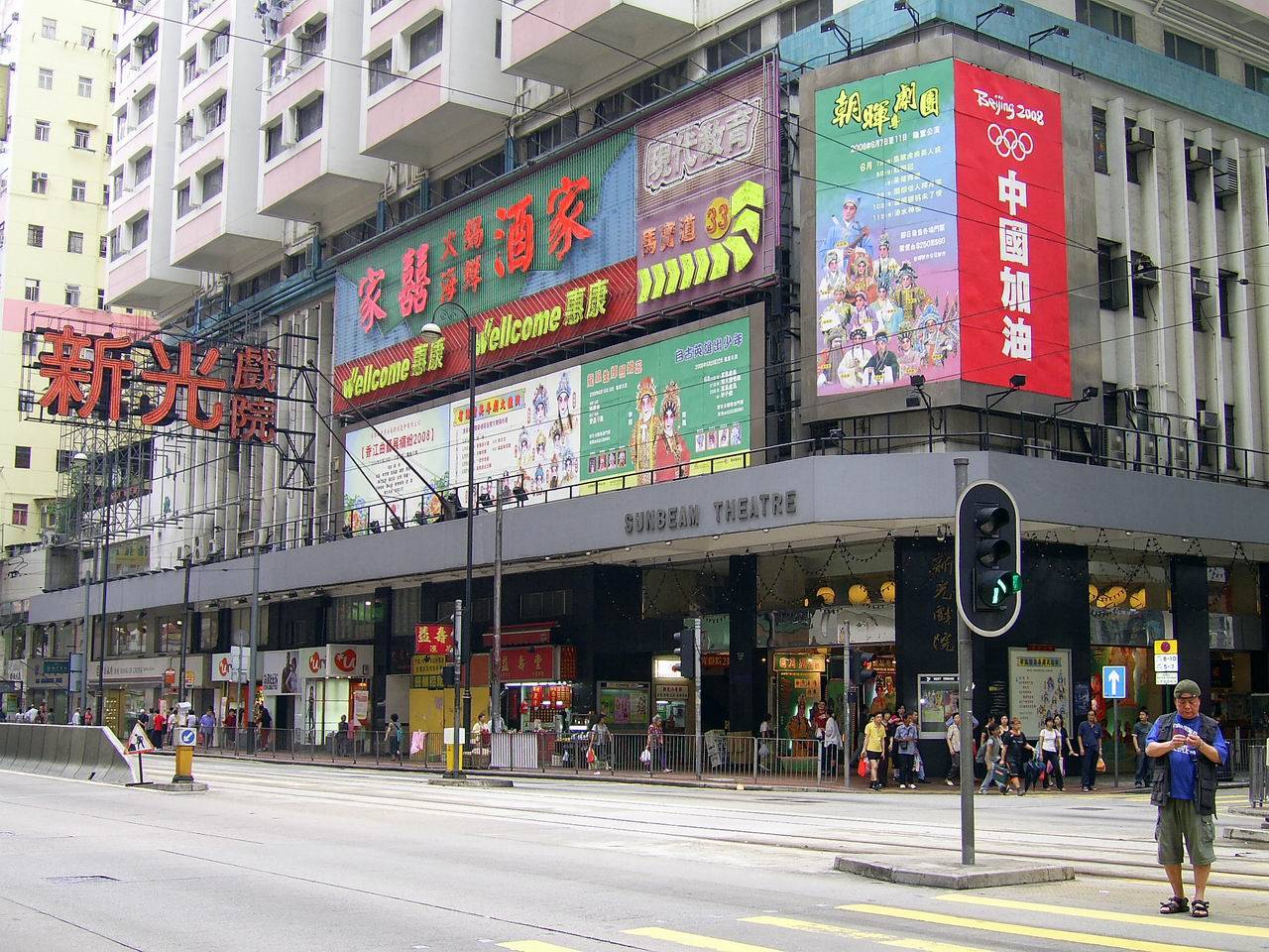 中文（香港）: 新光戲院